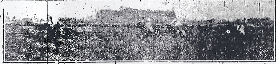 明治44年4月25日に宮城県で行われた競馬の写真です。明治44年4月27日に河北新報に掲載されました。